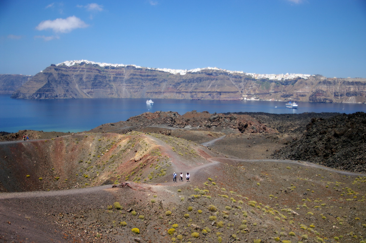 Krater auf der Insel Nea Kameni, Santorini